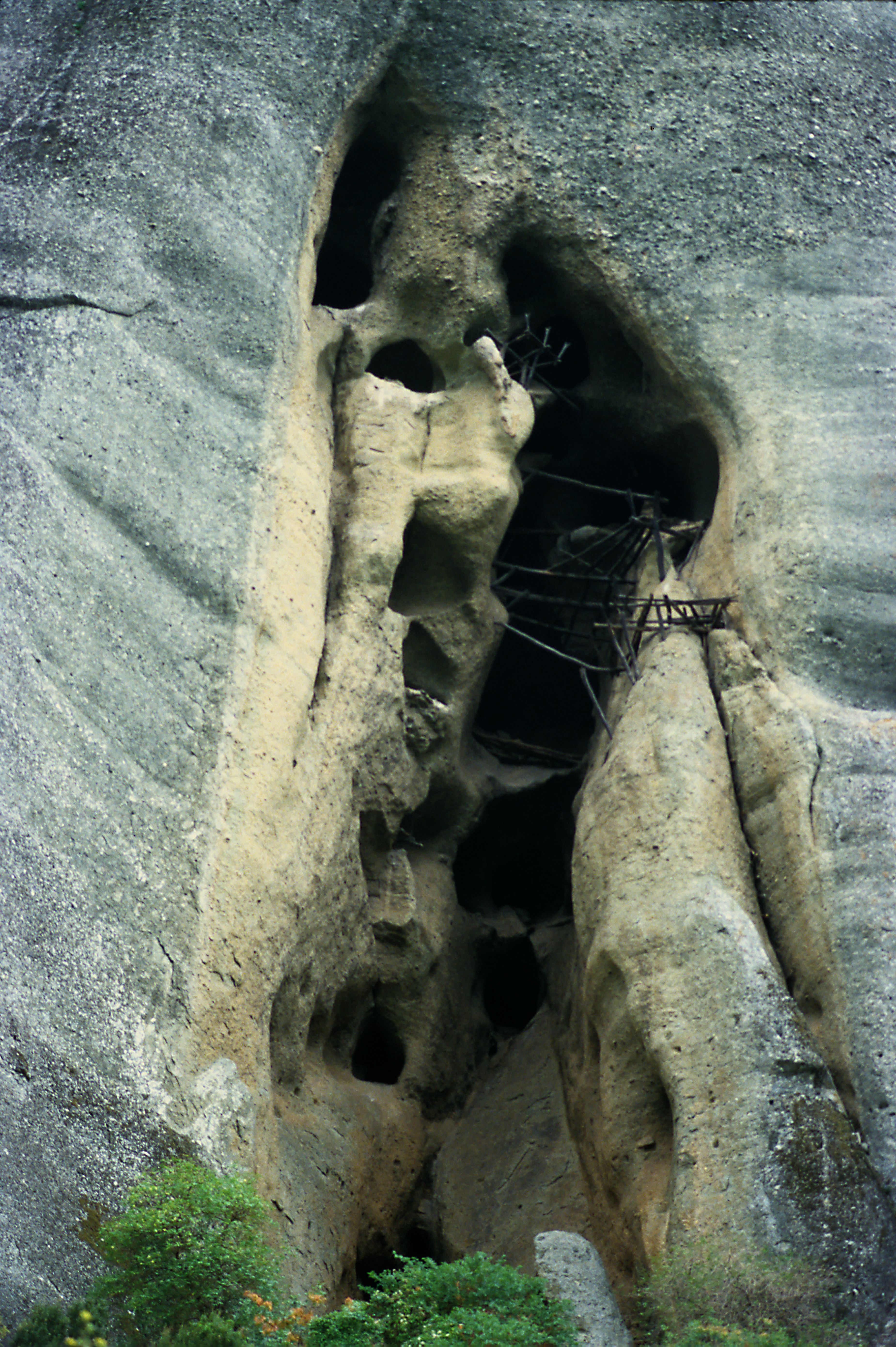 Höhle im Agion-Pnewna-Turm, bekannt als »Mönchsgefängnis«